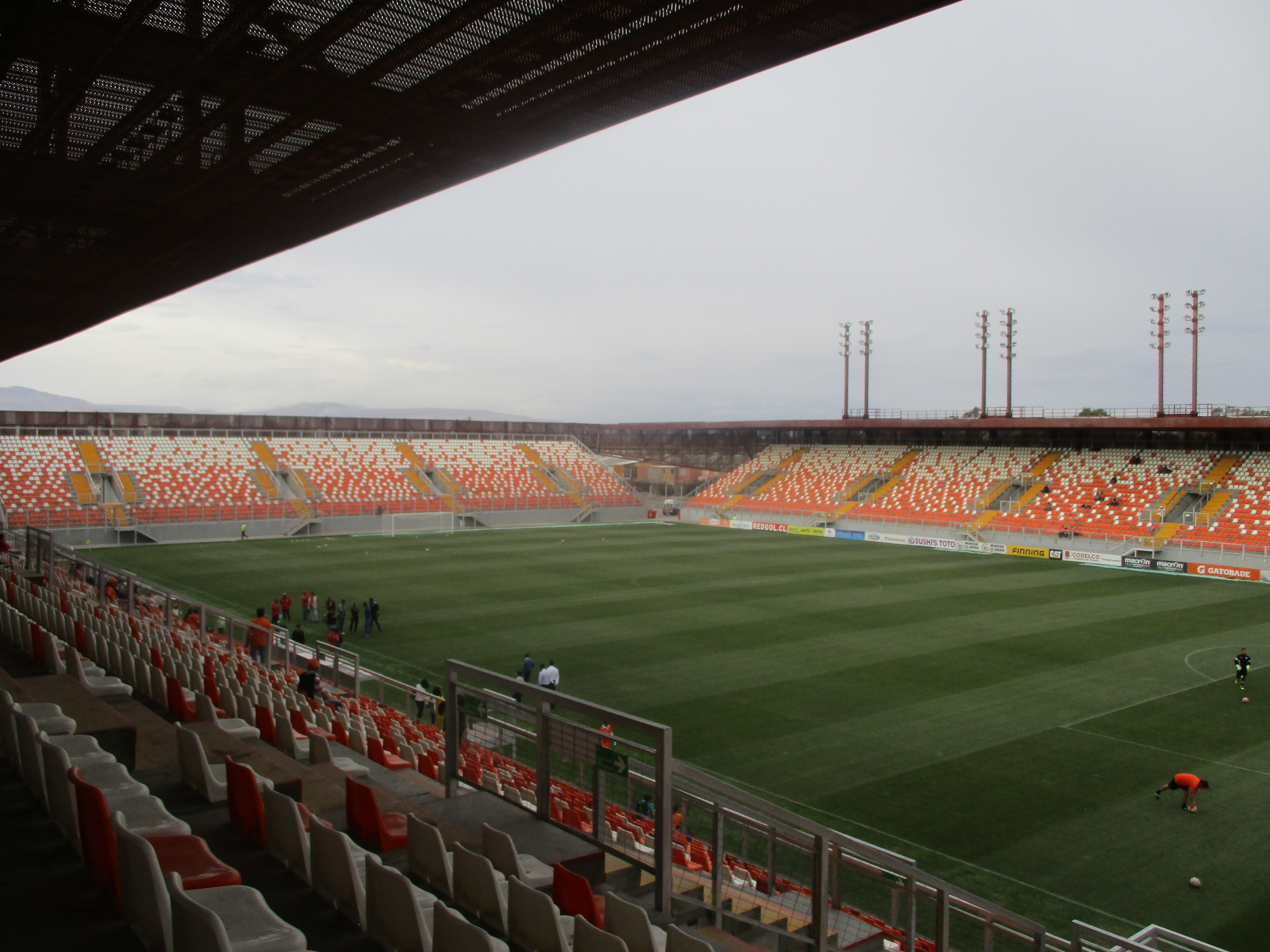 Imágen del estadio Zorros del Desierto de Calama en la fecha de enero de 2017.